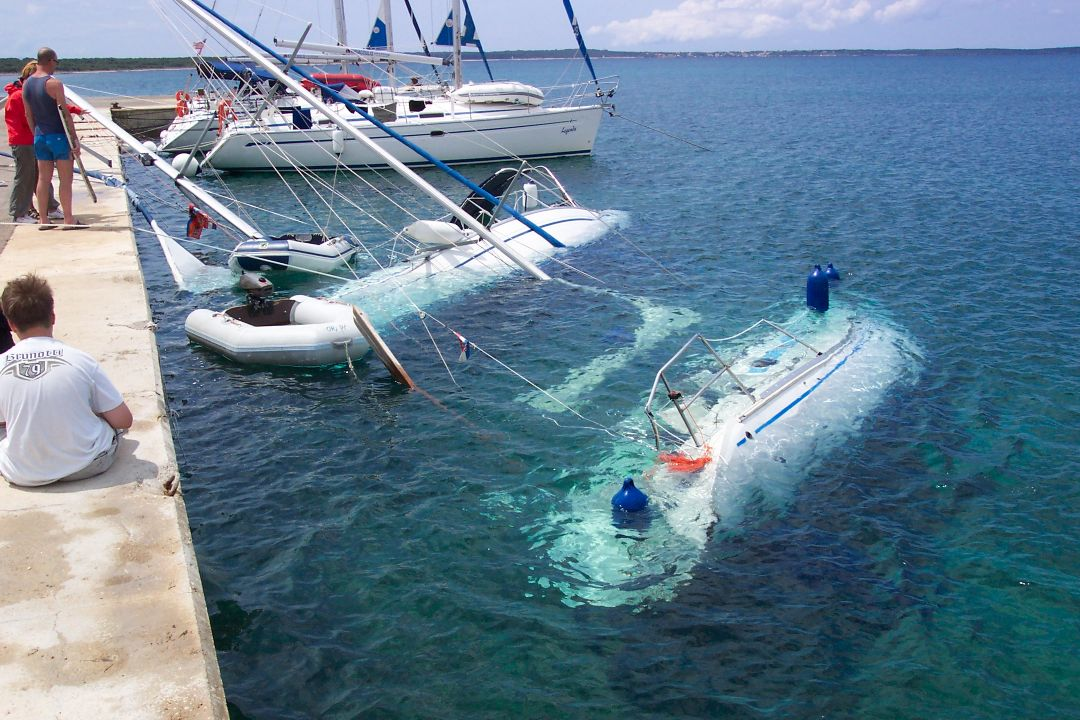 Auswirkungen eines Nevera/Neverin Sturms in einem nach westen offenen Hafen in der kroatischen Nordadria. Fotografiert von Nils Niederstebruch im Juni 2004